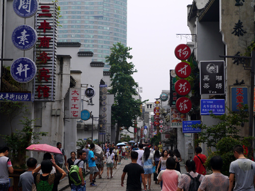 太平街历史街区